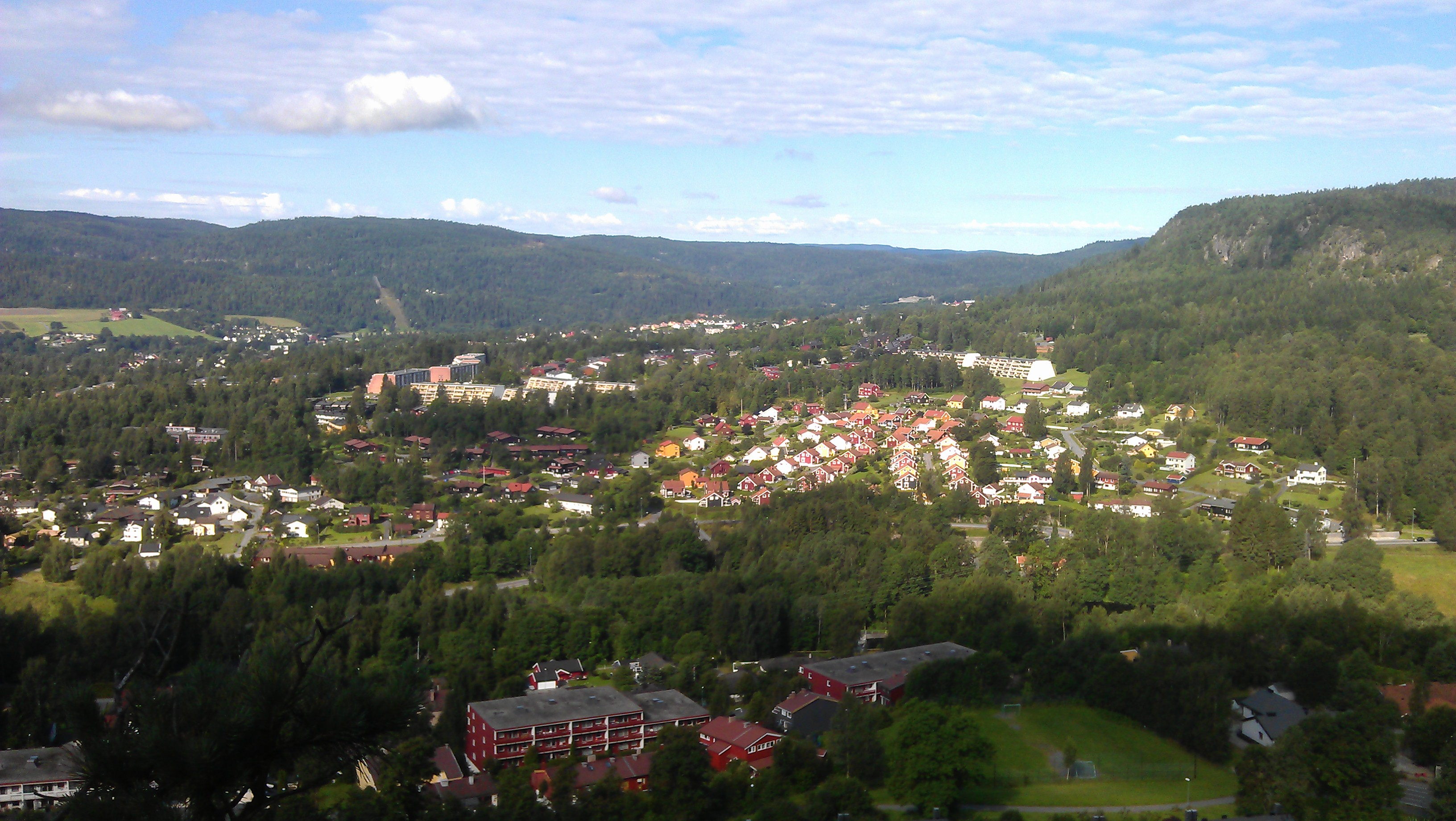 Rykkinn i Bærum, med Eineåsen til høyre og Skuibakken i bakgrunnen